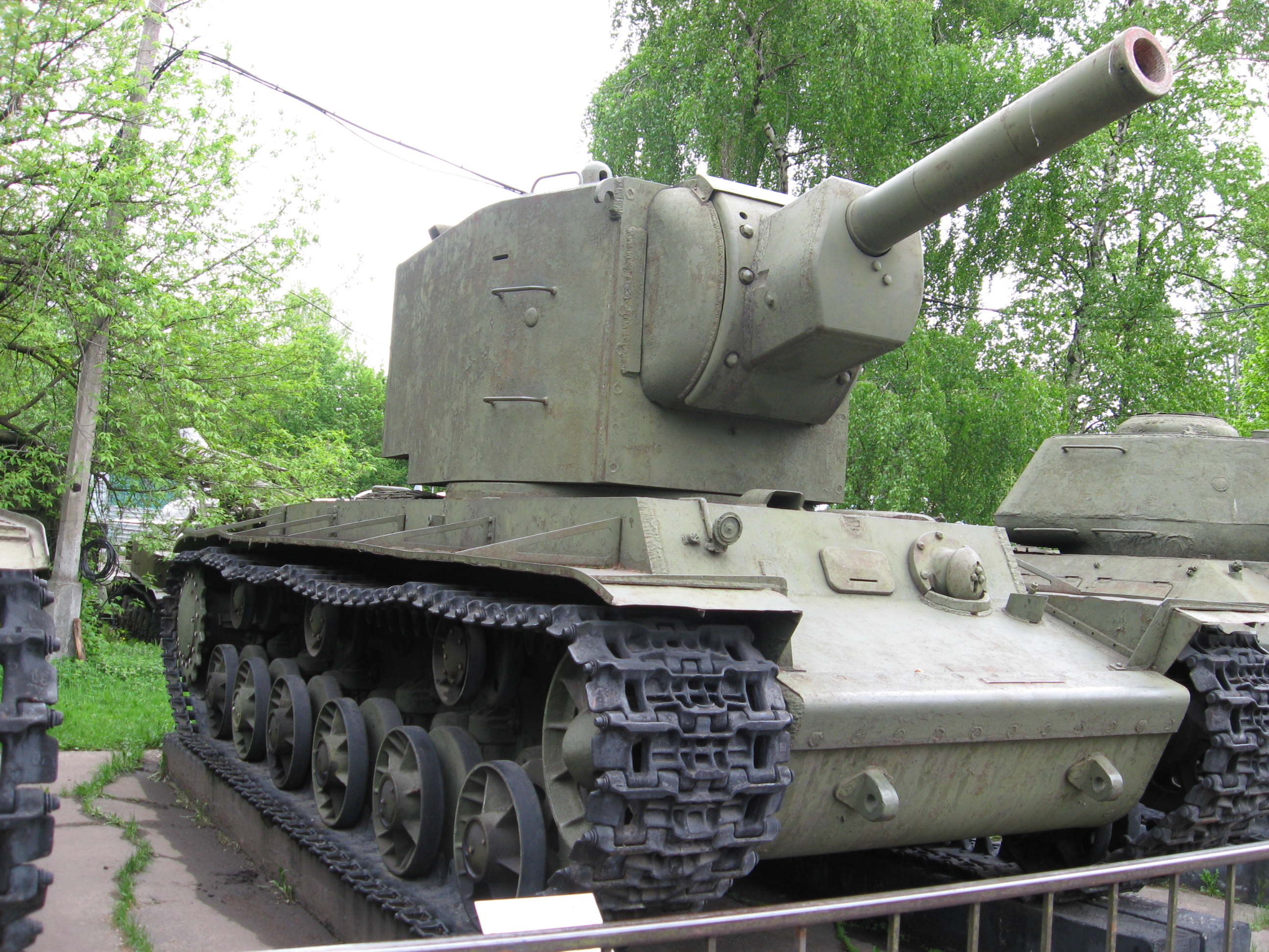 Тяжелый танк Кв-2 в Центральном музее вооруженных сил (г. Москва)